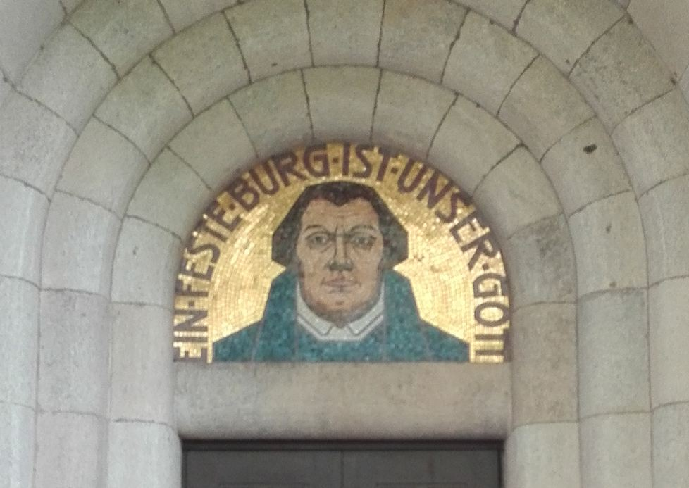 Lutherkirche Heidt, Luthermosaik